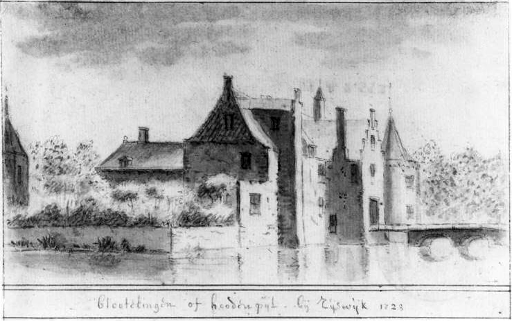 Castle te Blotinge in Rijswijk, Netherlands (south side)